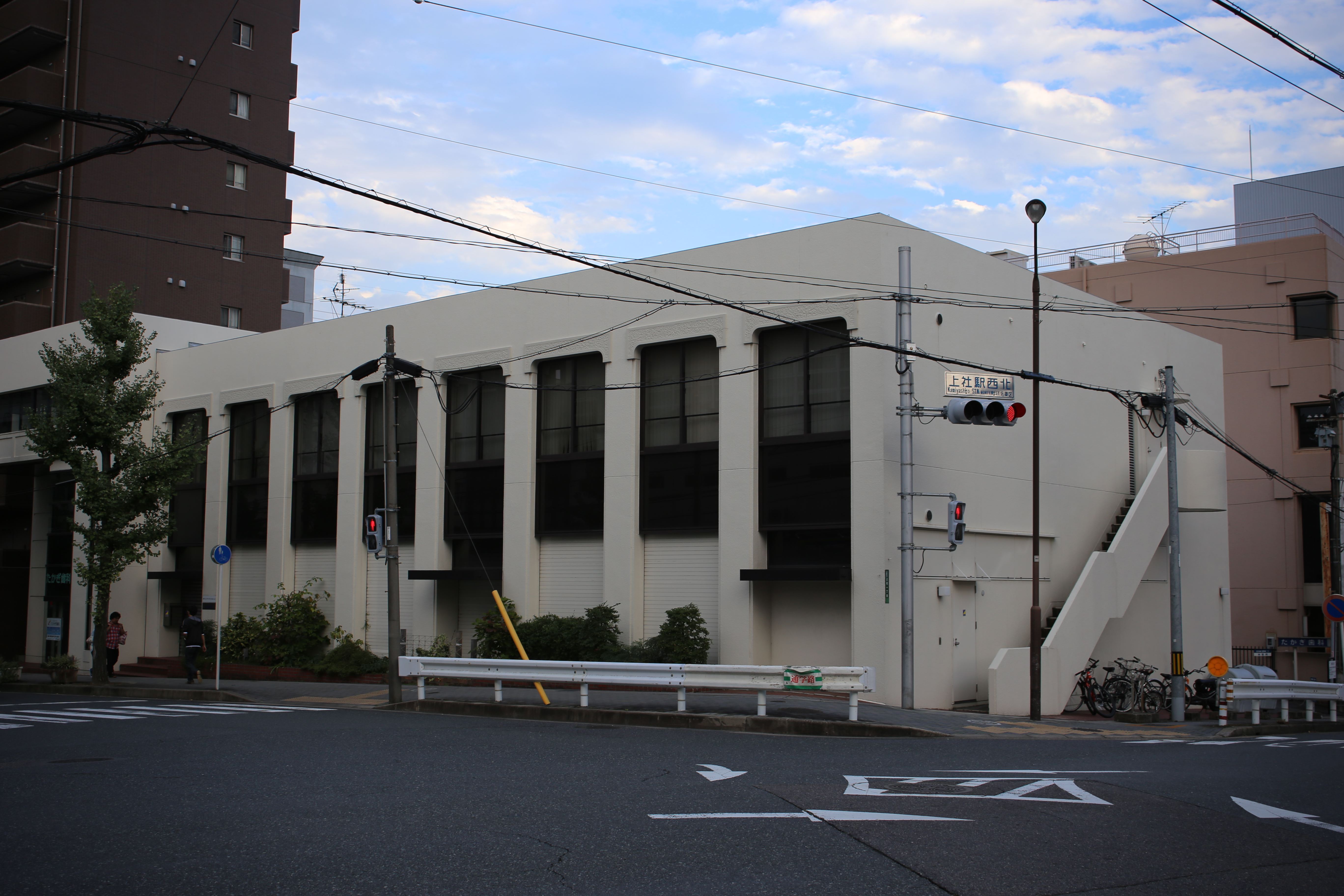 名古屋市名東区上社のヴィレッジヴァンガード本社を北側公道西側より撮影